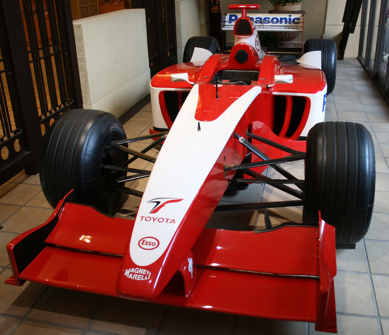 Toyota TF101 (AM01)